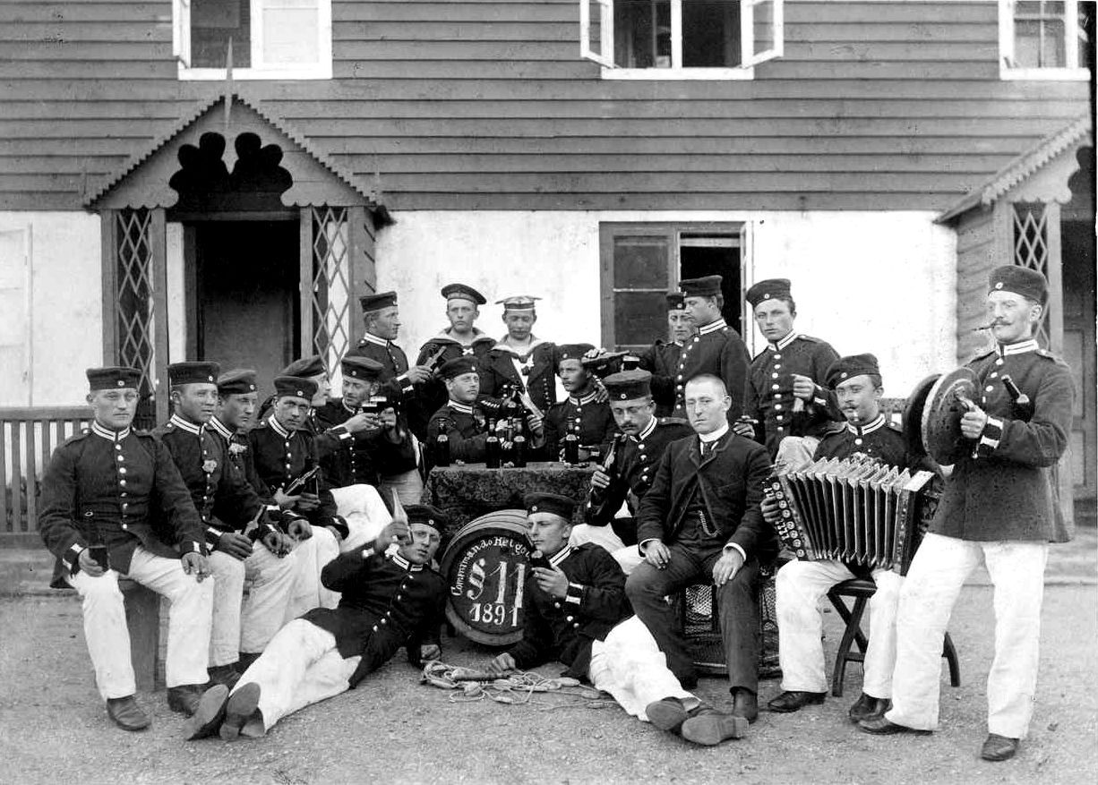 1891 Vor der ehemaligen englischen Kaserne feiern deutsche Soldaten. In zivil der Helgoländer Brauereibesitzer Konsul Johann Gottlob Bufe (1832 -1898) mit skeptischem Blick.